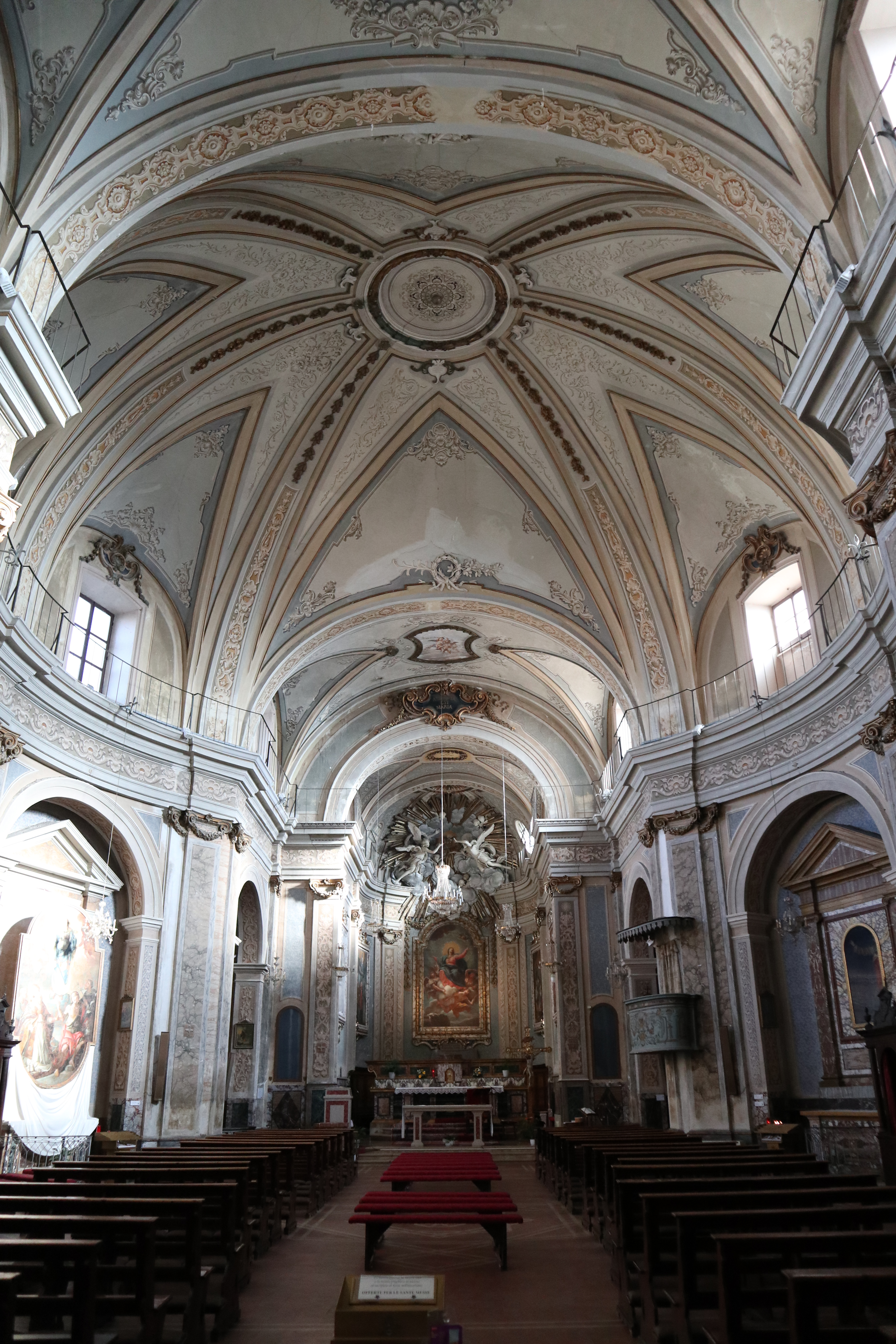 Interno